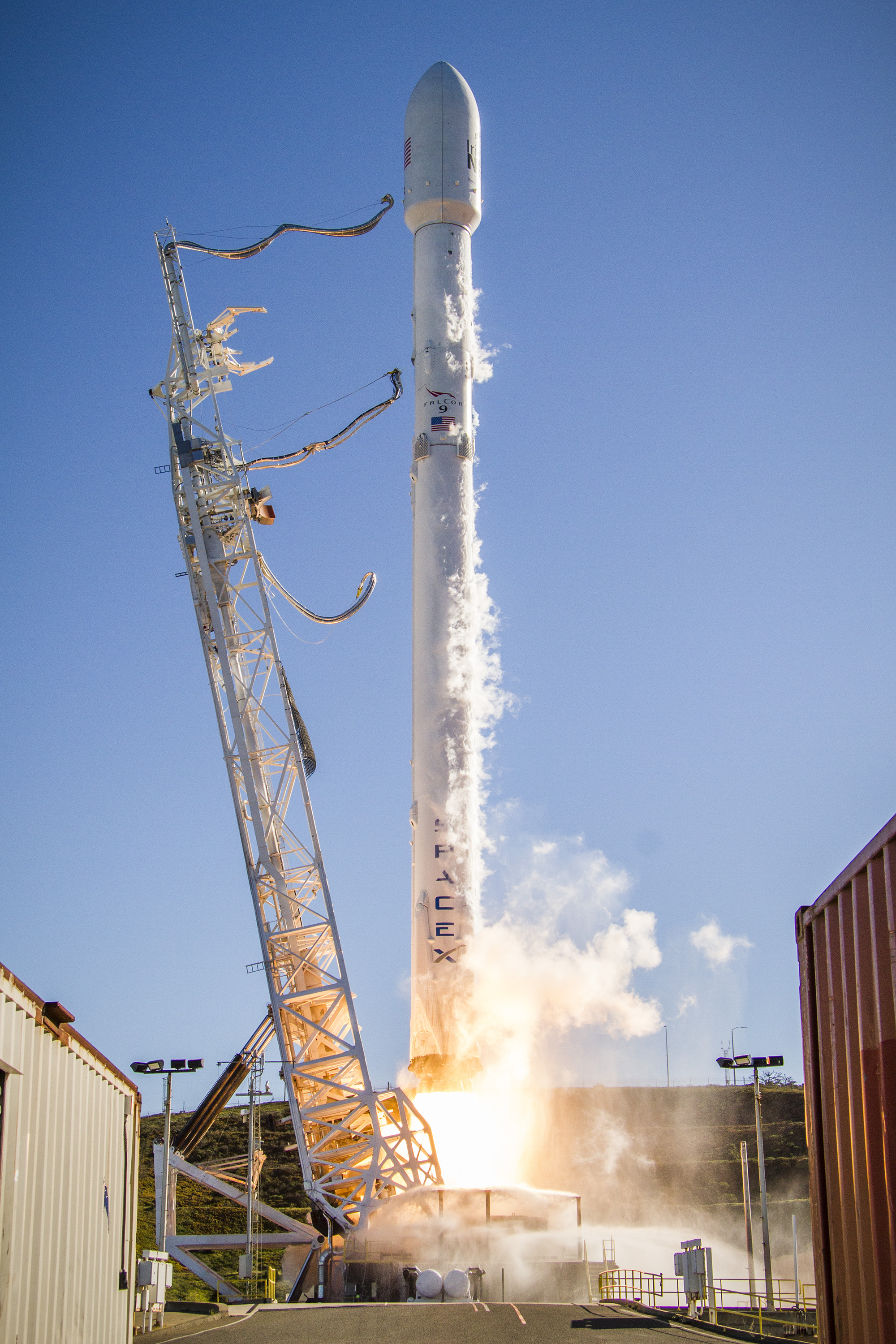 Iridium-1 Launch